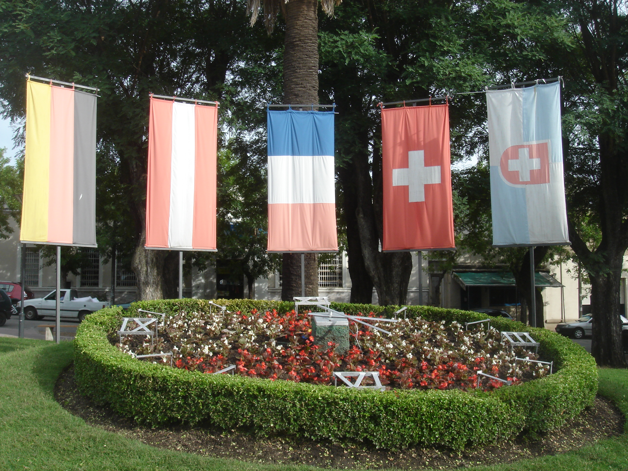 Plaza de los Fundadores, Nueva Helvecia, Colonia